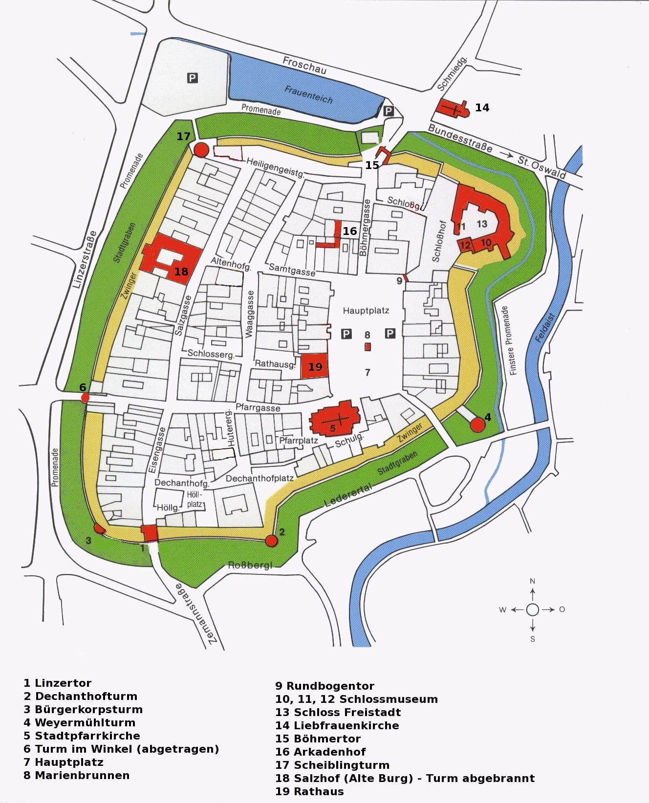 Stadtplan der Altstadt Freistadts mit eingezeichneten Bauten